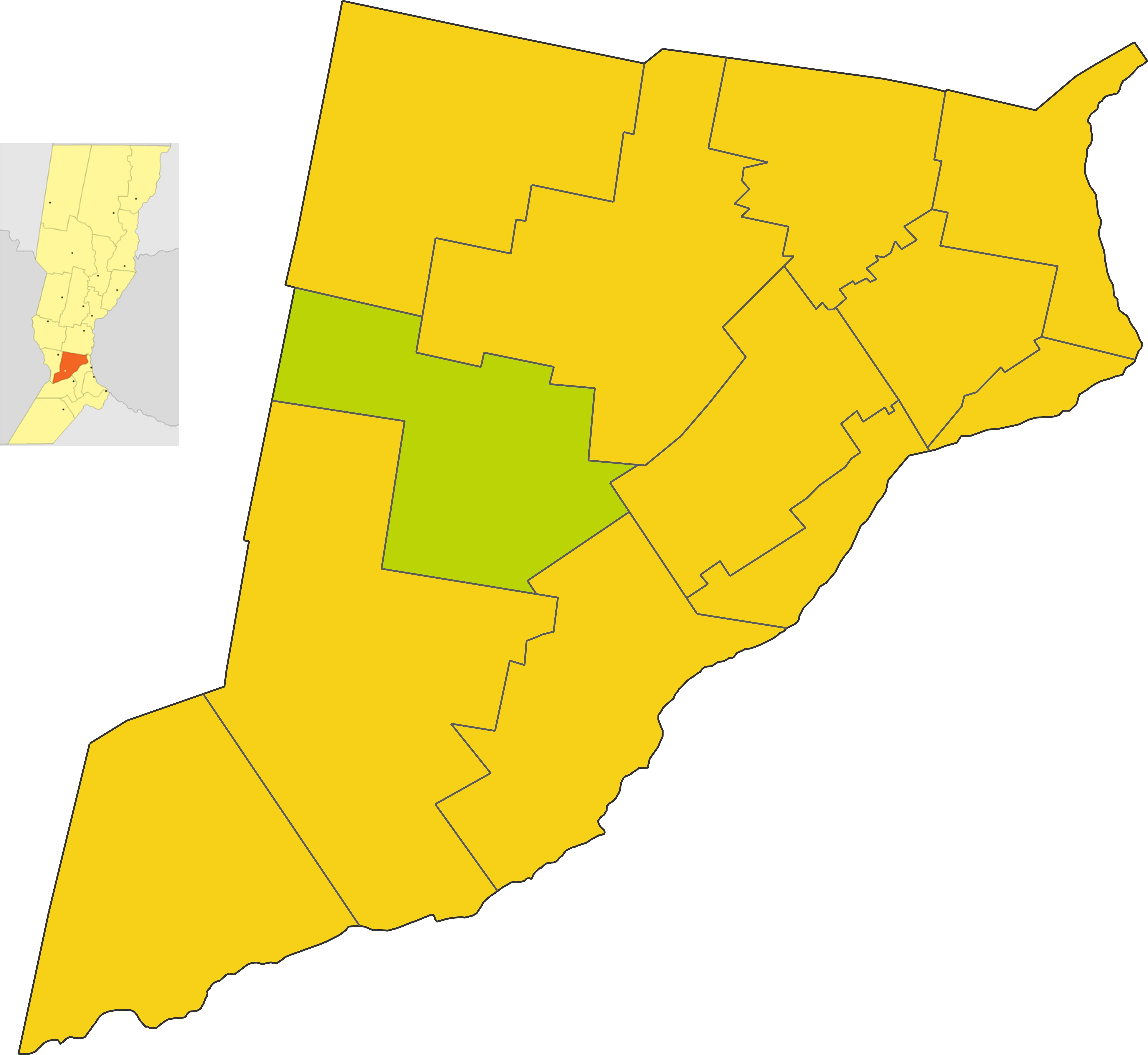 Map of the comuna de Bustinza in Iriondo department, Santa Fe province, Argentina